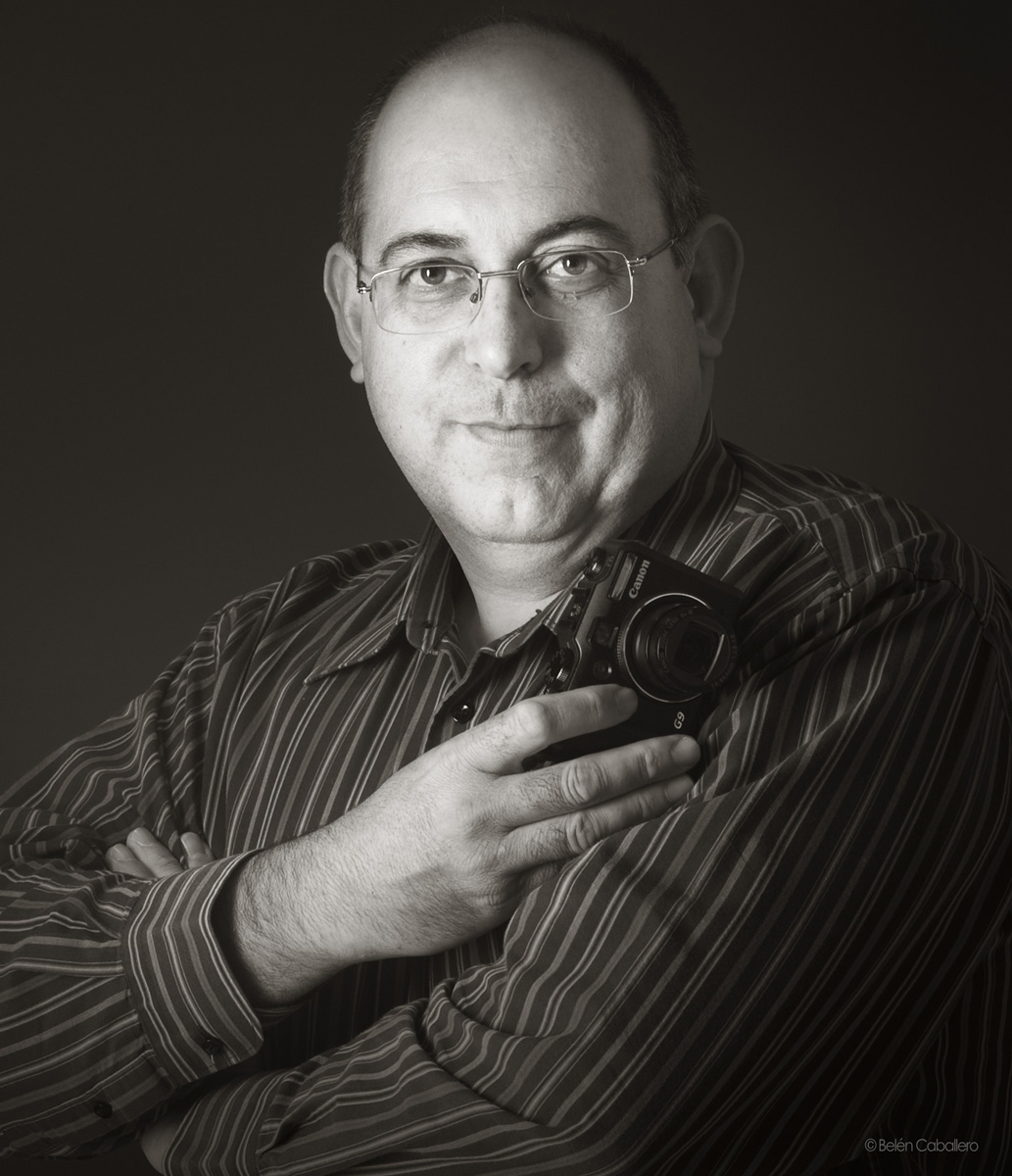 Retrato de José Benito Ruiz Limiñana.